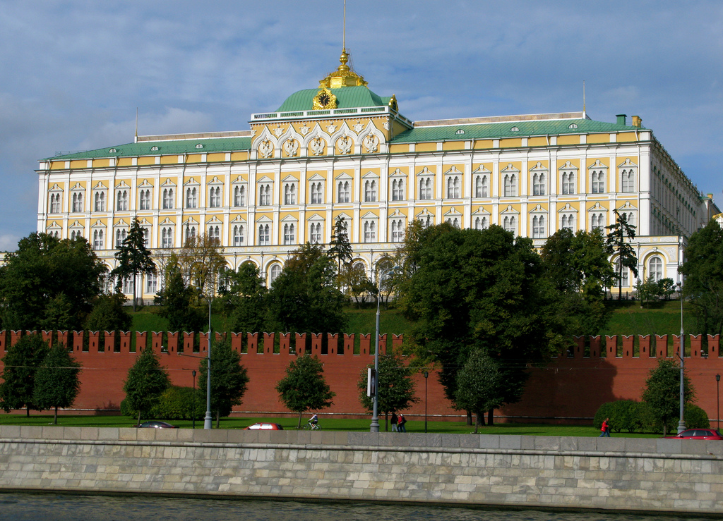 Grand Kremlin Palace, Moscow